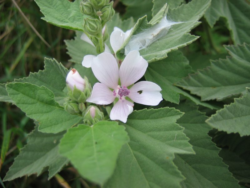 Echter Eibisch Althaea officinalis, Wismarbucht